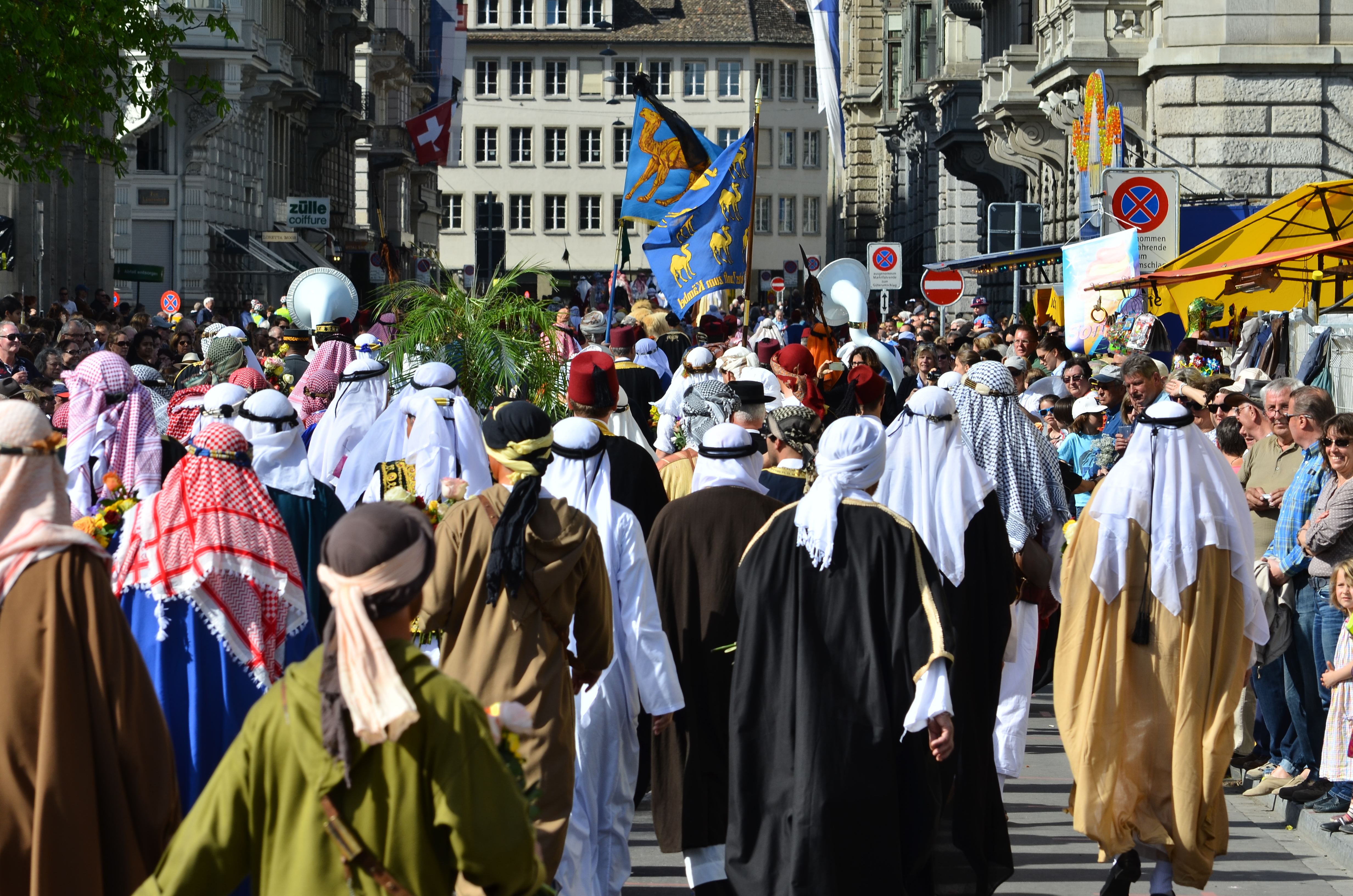 Sechseläuten 2015 : Sechseläutenumzug, Zunft zum Kämbel, Bürkliplatz in Zürich (Switzerland)